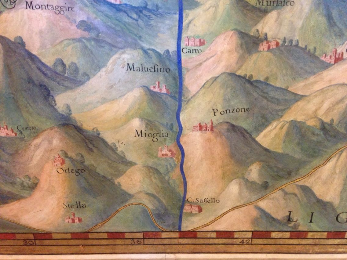 Il paese di Mioglia sull'affresco nella Galleria delle Carte Geografiche presso i Musei Vaticani